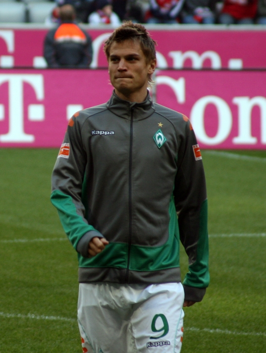 Markus Rosenberg im Spiel gegen Bayern München